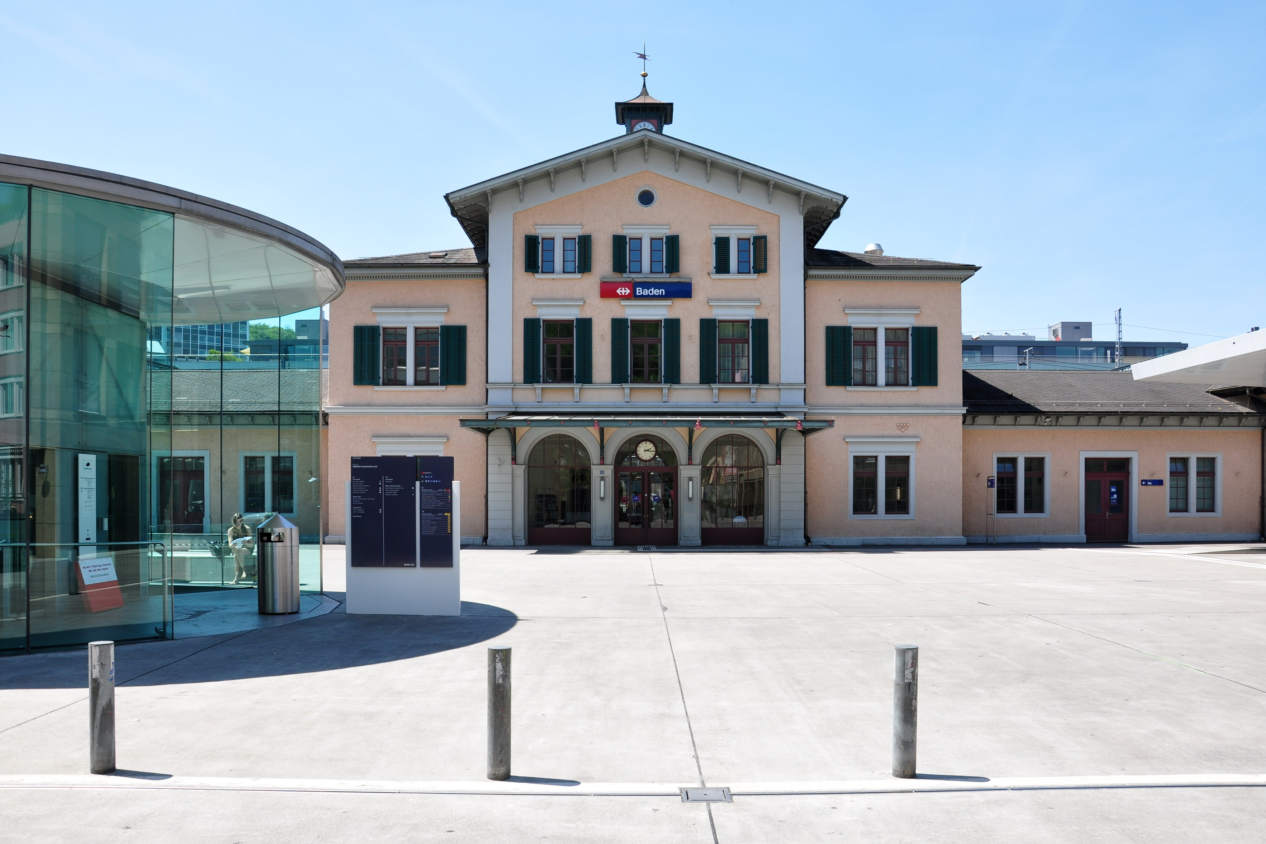 Bahnhof Baden (Switzerland)